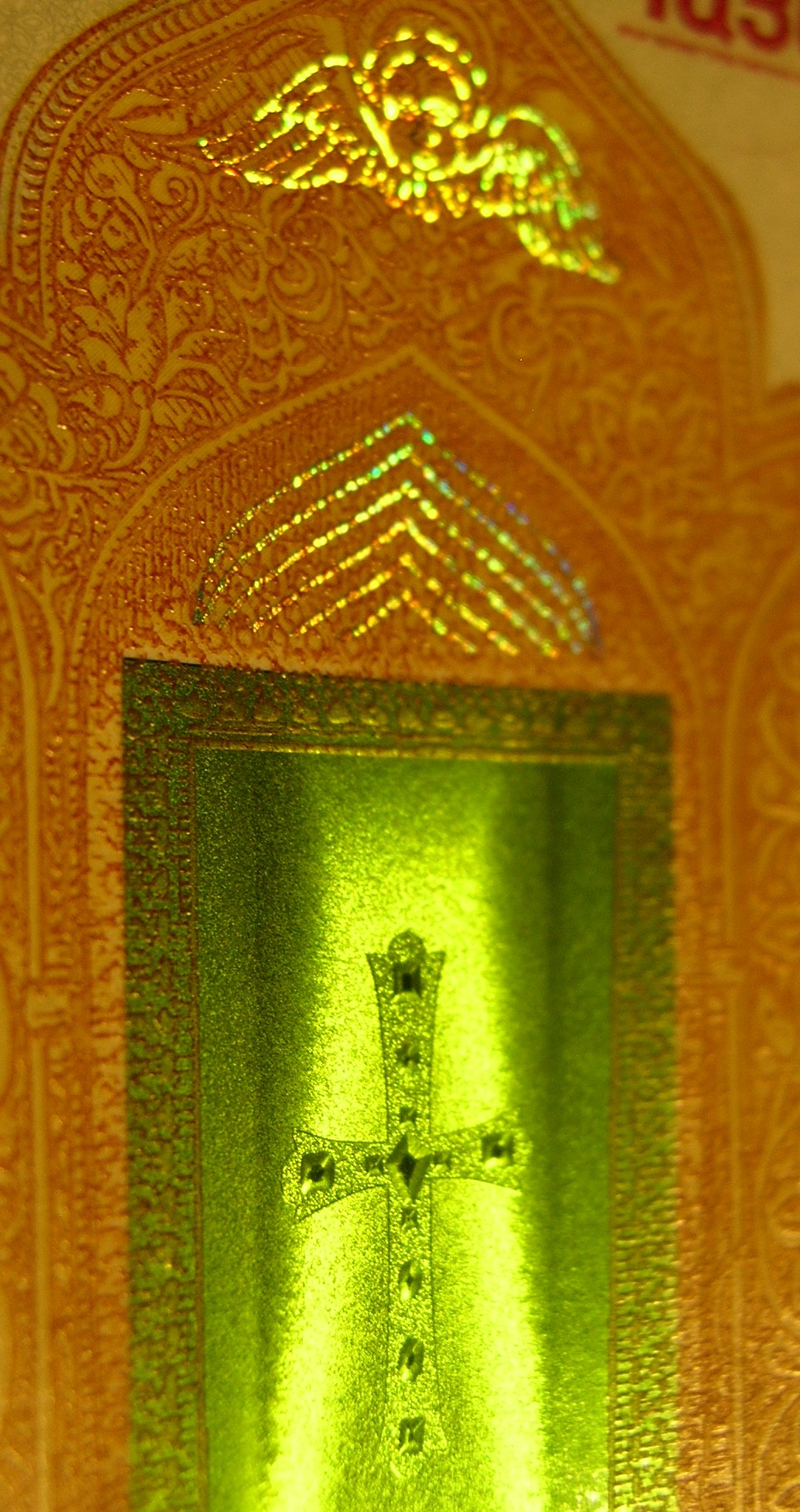 Stereogram na bankovce Armenie (2018)